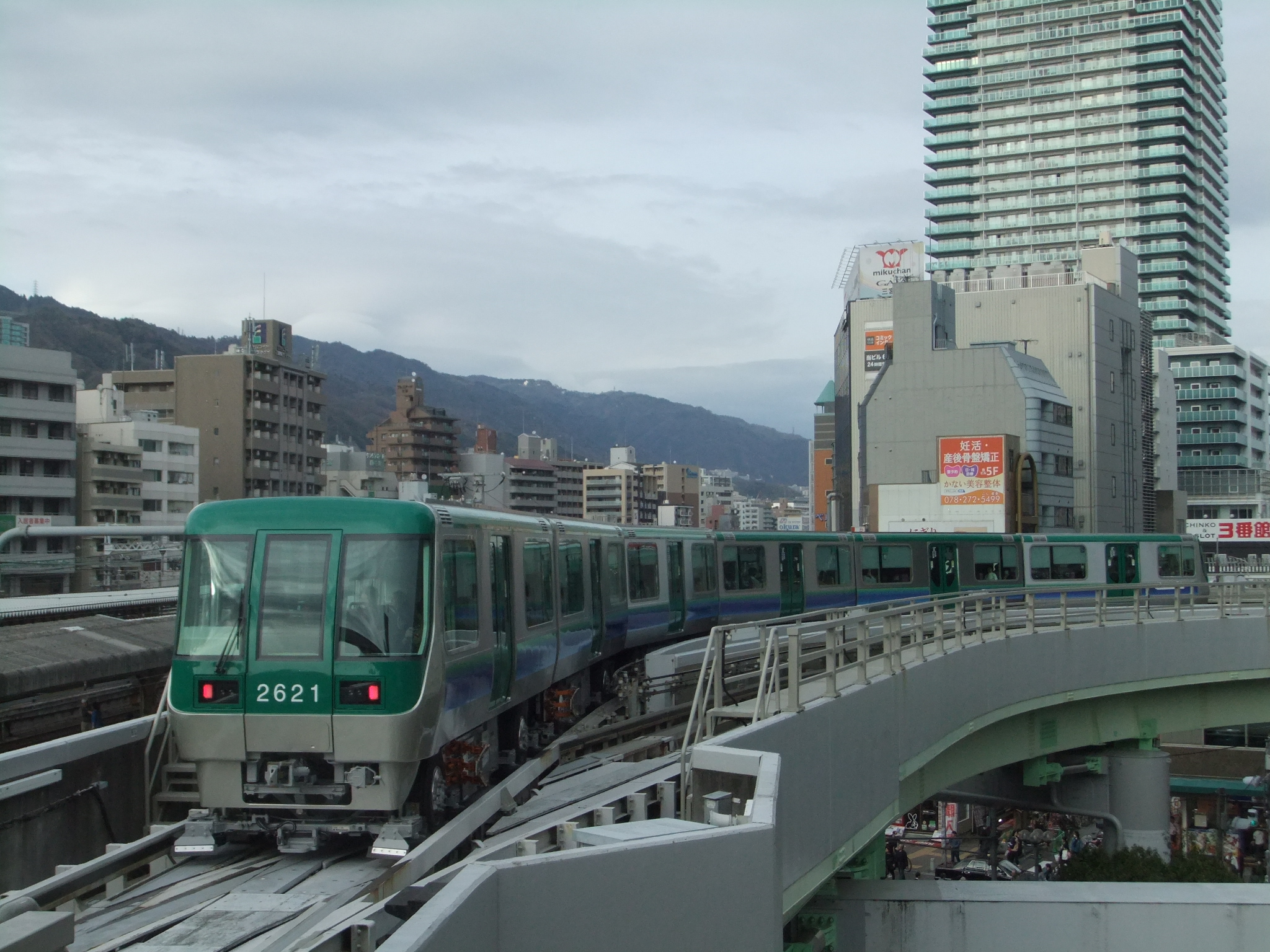 神戸新交通 ポートライナー2020型21編成